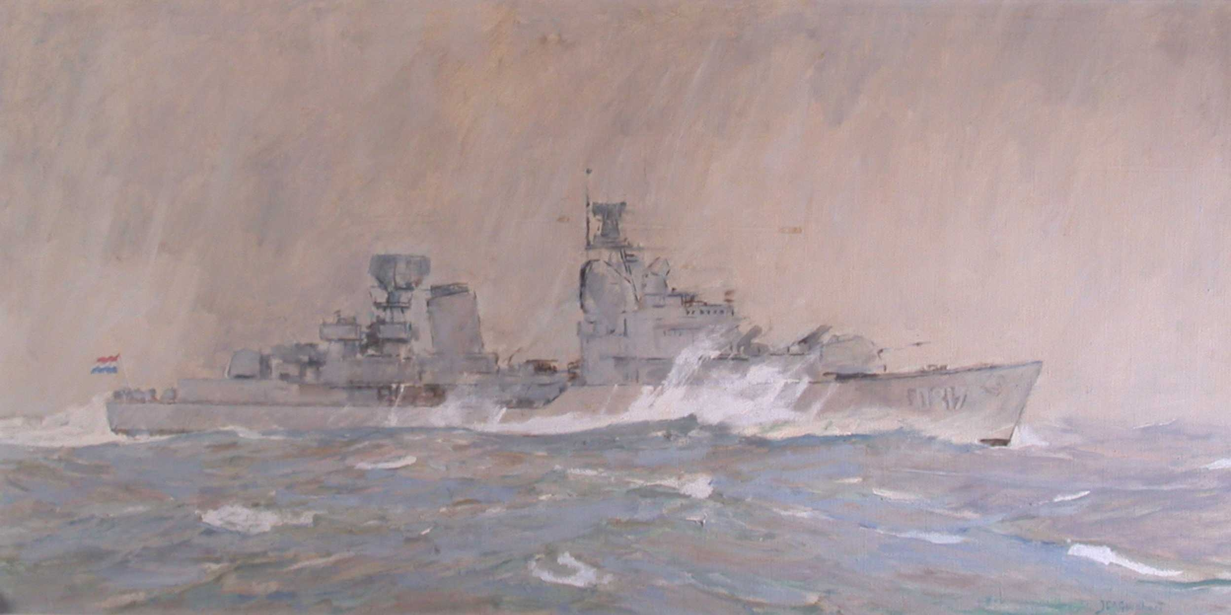 door Jan Goedhart